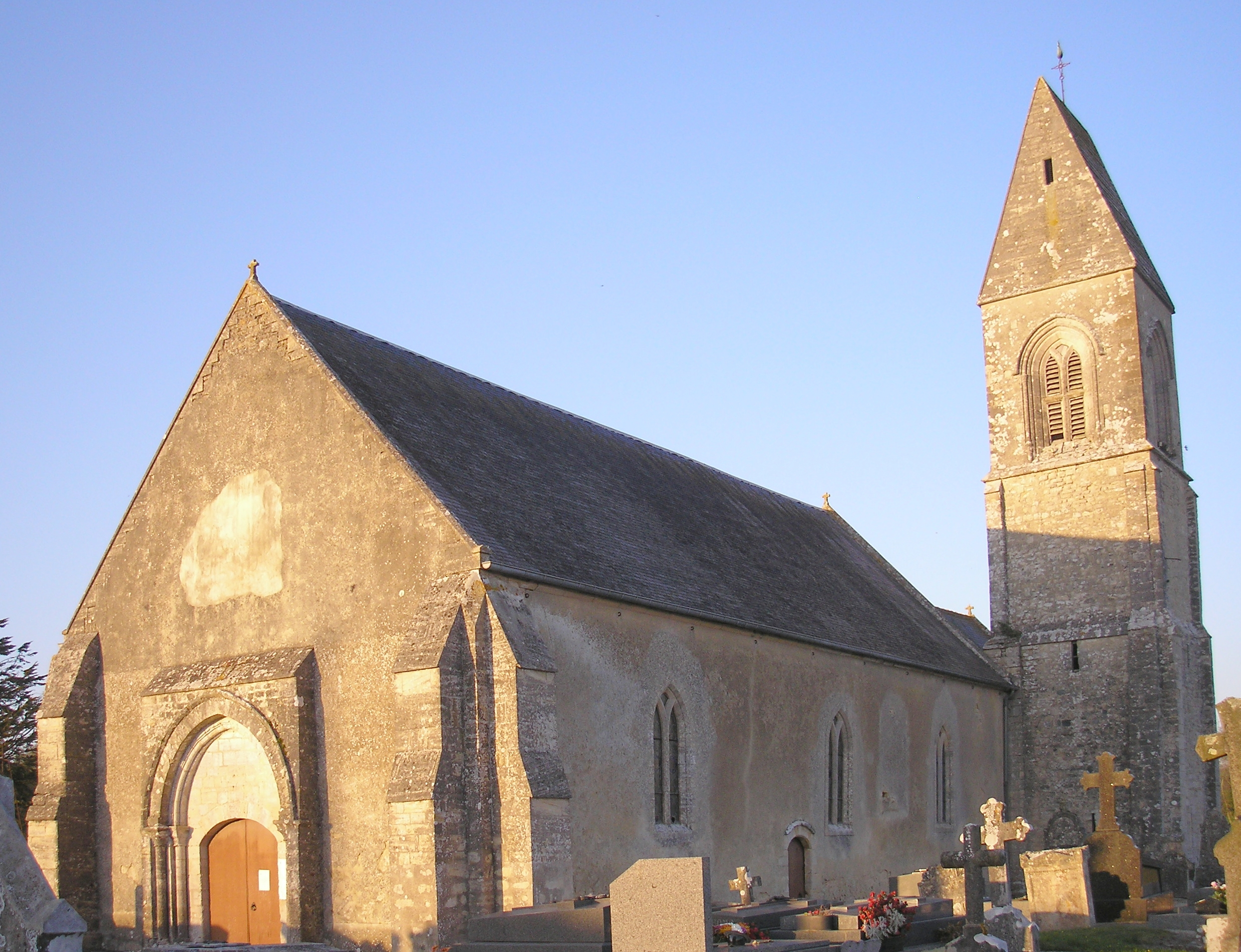 Crouay (Normandie, France). L'église Saint-Martin.